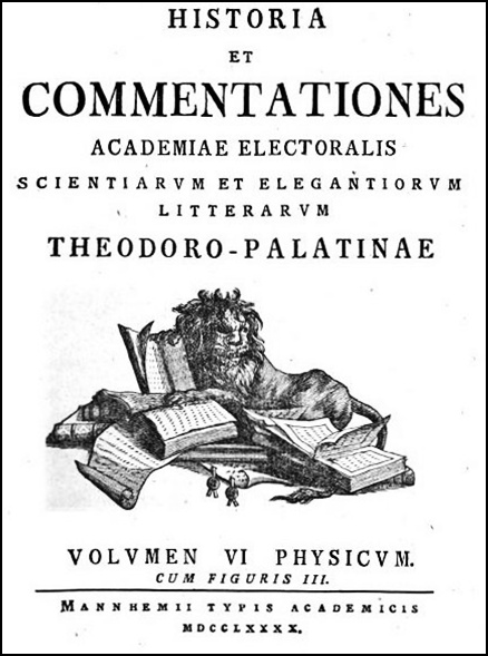 Kurpfälzische Akademie der Wissenschaften Mannheim, Titelblatt der Acta Academiae Theodoro-Palatinae, Jahresband 1790